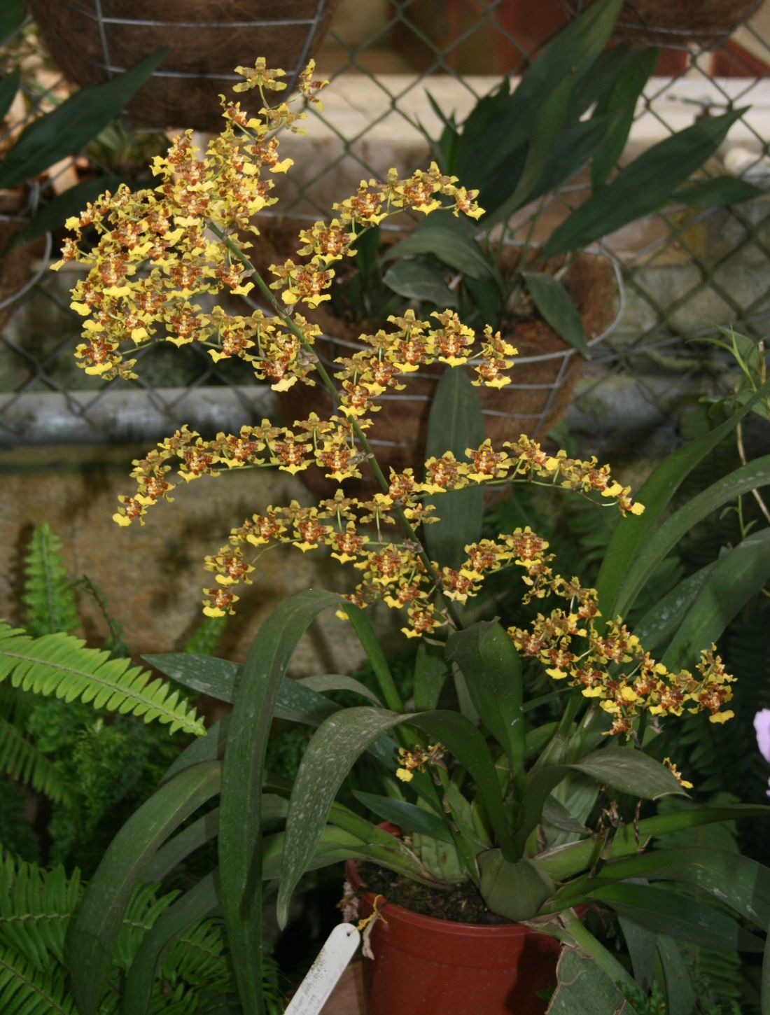 Oncidium polycladium, Orchideen (Orchidaceae) - Costa Rica: Prov. Cartago, Paraíso, Jardín Botánico Lankester/Lankester Botanical Garden, Orchid greenhouse